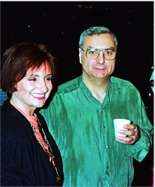 שותפים להפקת שיר לשלום רחל הרמתי ויאיר רוזנבלום